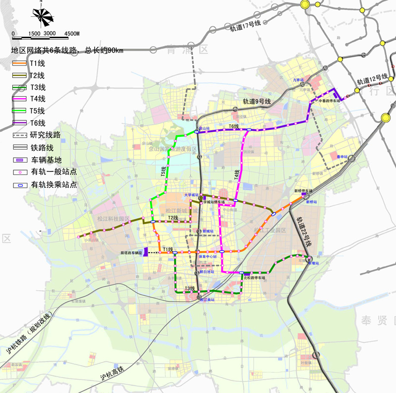 中文（中国大陆）: 松江有轨电车规划